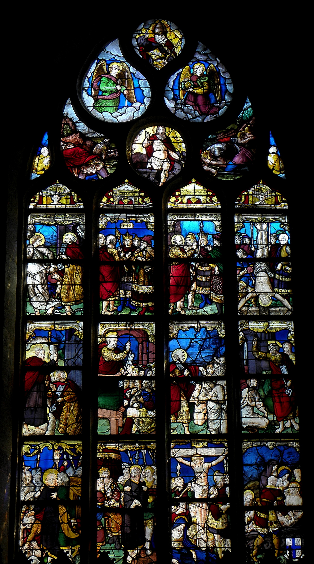 Maîtresse-vitre de l'église Saint-Pierre de Beignon (56).